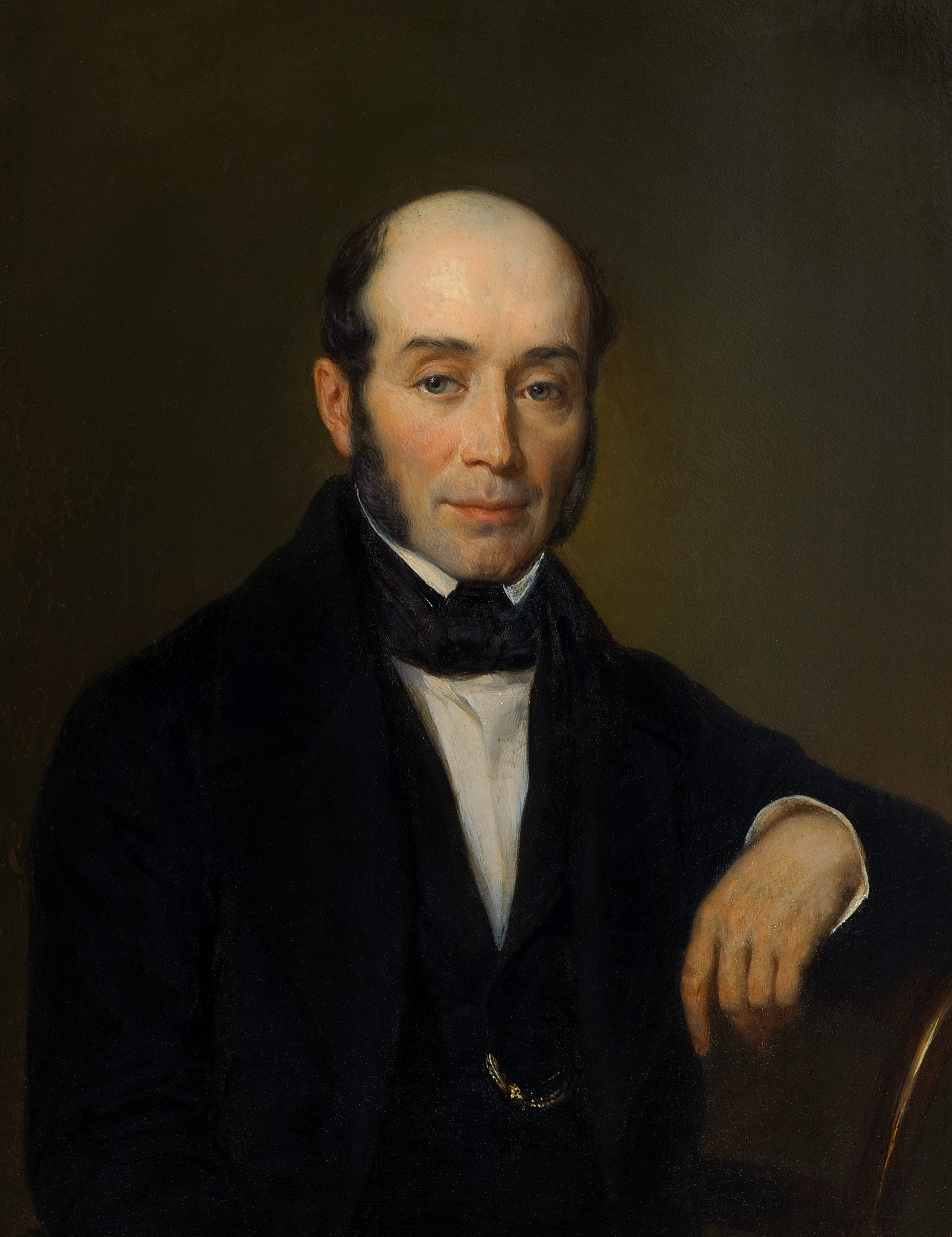 Porträt Emanuel Eduard Fueter (1791-1854), Mediziner.